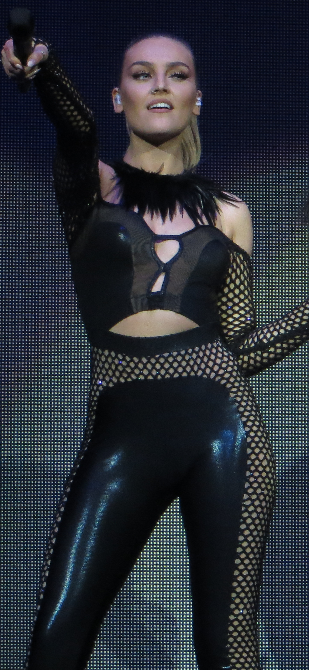 Little Mix 10